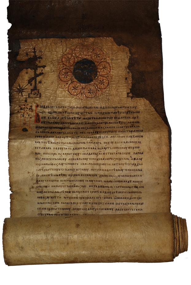 Почетак Дечанске повеље (потписи Стефана Дечанског и Цара Душана) (arhiva SANU)